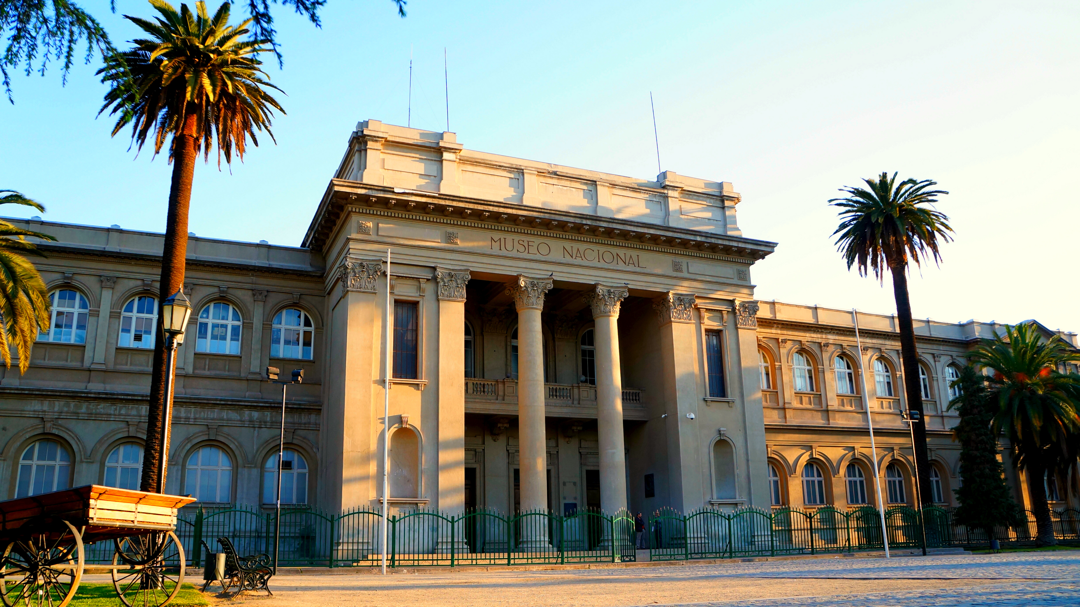 Museo Nacional de Historia Natural This is a photo of a national monument in Chile: 879